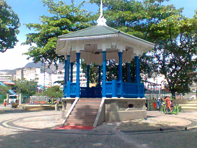 Para aqueles que buscam programas tradicionais na capital fluminense, um passeio diurno pelo Jardim do Méier pode ser uma boa opção. Todo mês tem atrações culturais para entreter o público que passa no local.